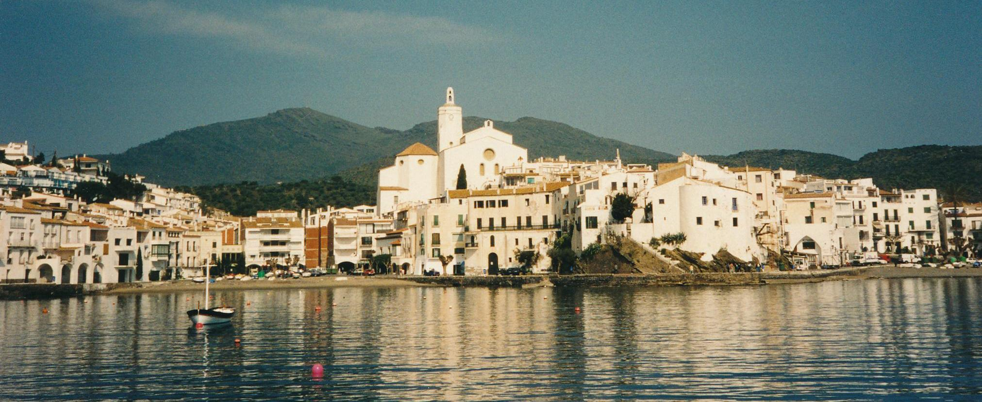 Anfahrt mit der "Don Pancho" auf Cadaques Datum: 04/2006 Urheber: Michael Pfeiffer Quelle: Privates Fotoalbum des Urhebers